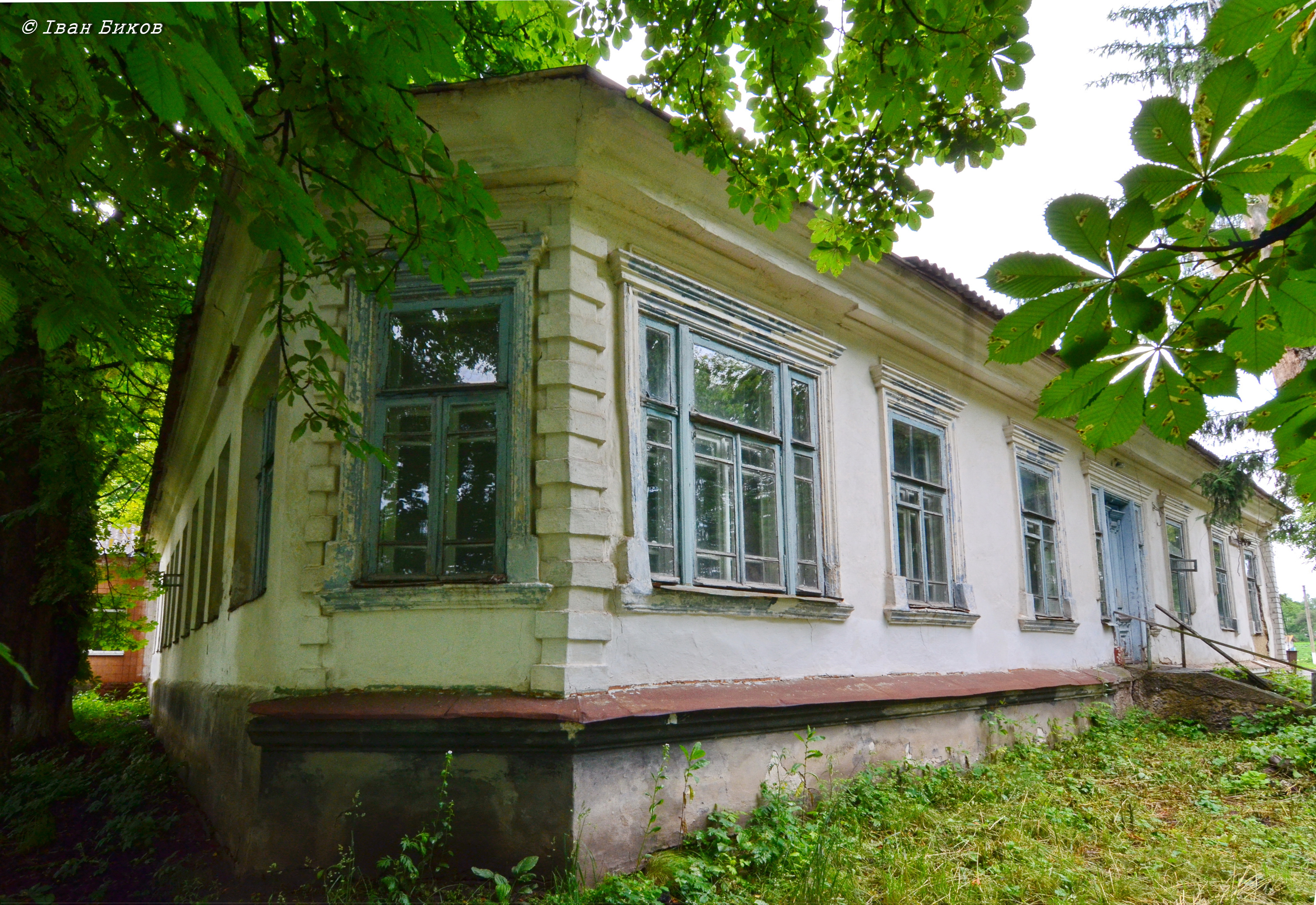 Вірогідно - найстаріша збережена споруда селища Чорнухи. Збудована у стилі класицизм.